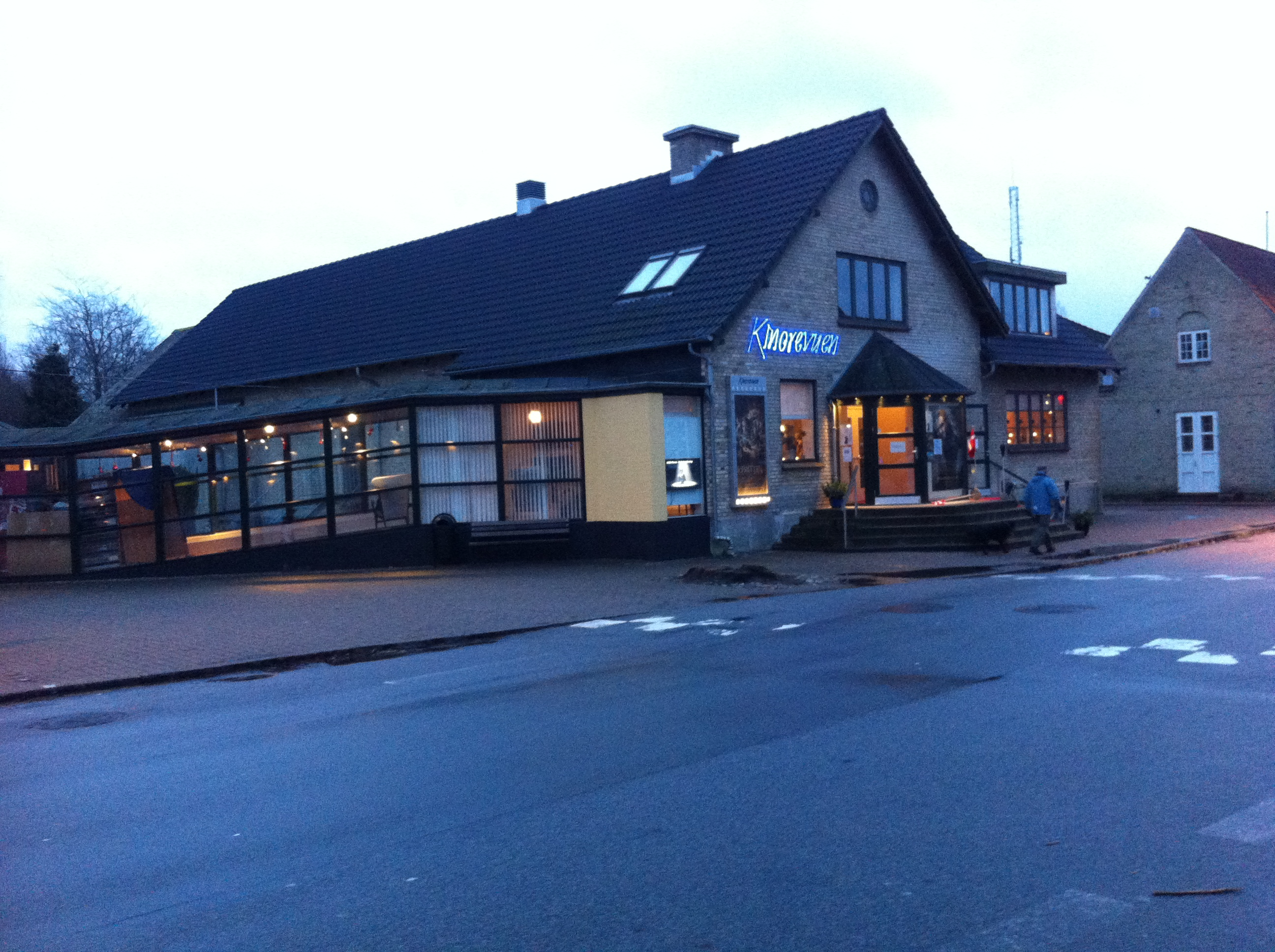 Kinorevuen i Skørping.